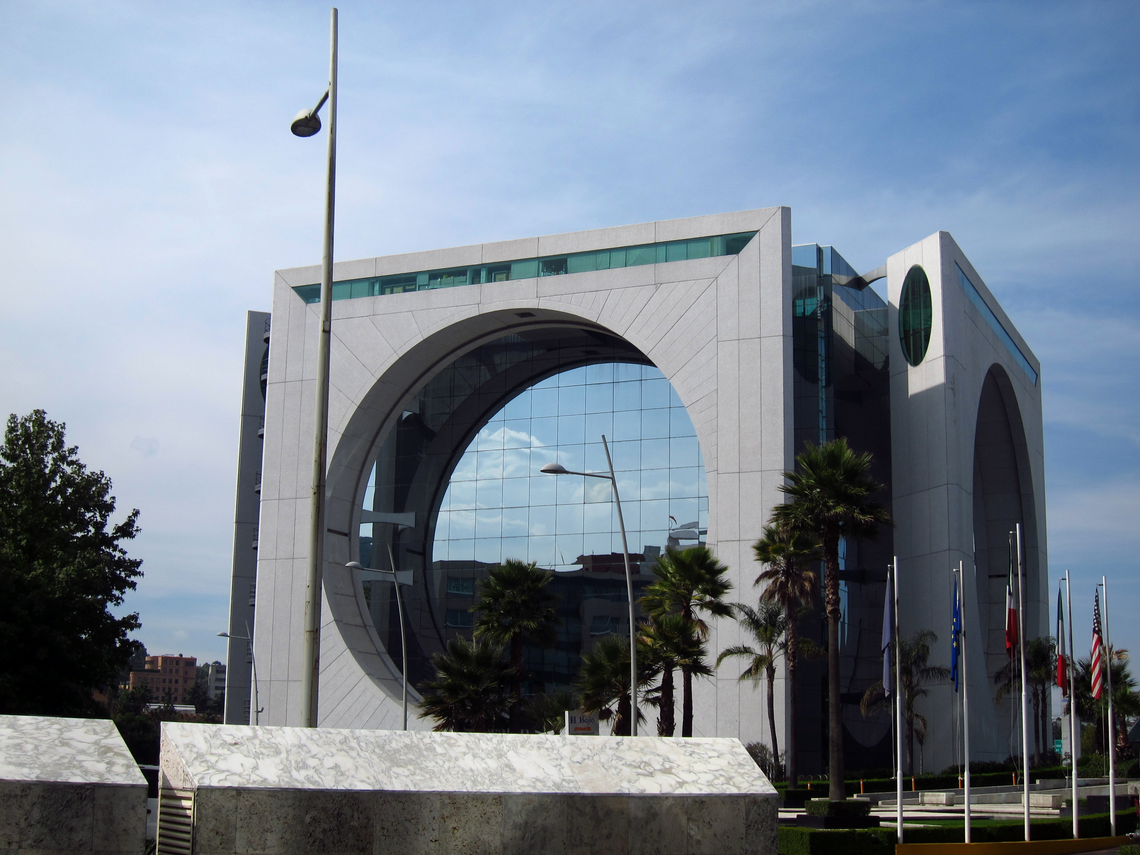 Ciudad de México Distrito Federal DF